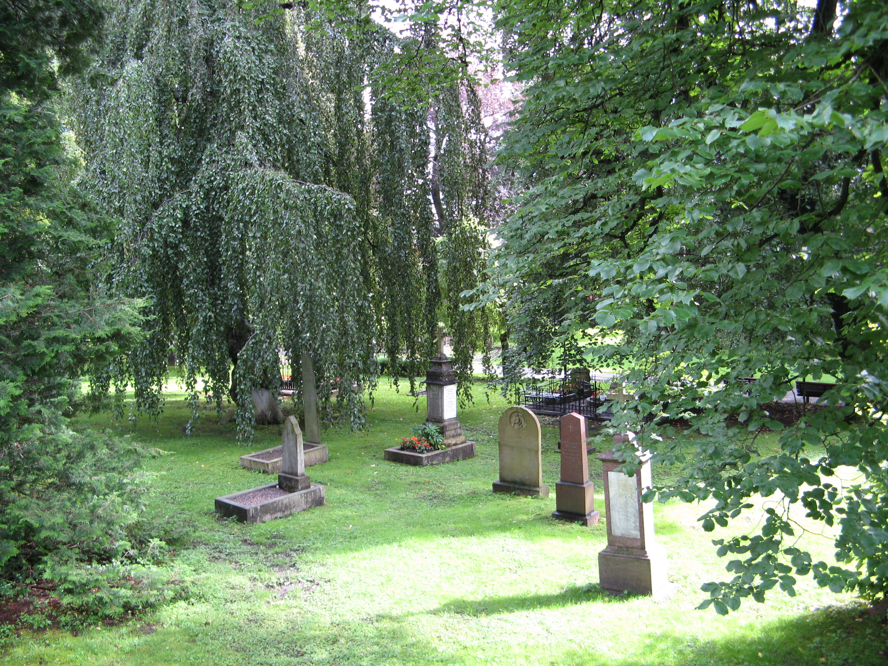 Assistentkirkegarden. Bergen, Norway.